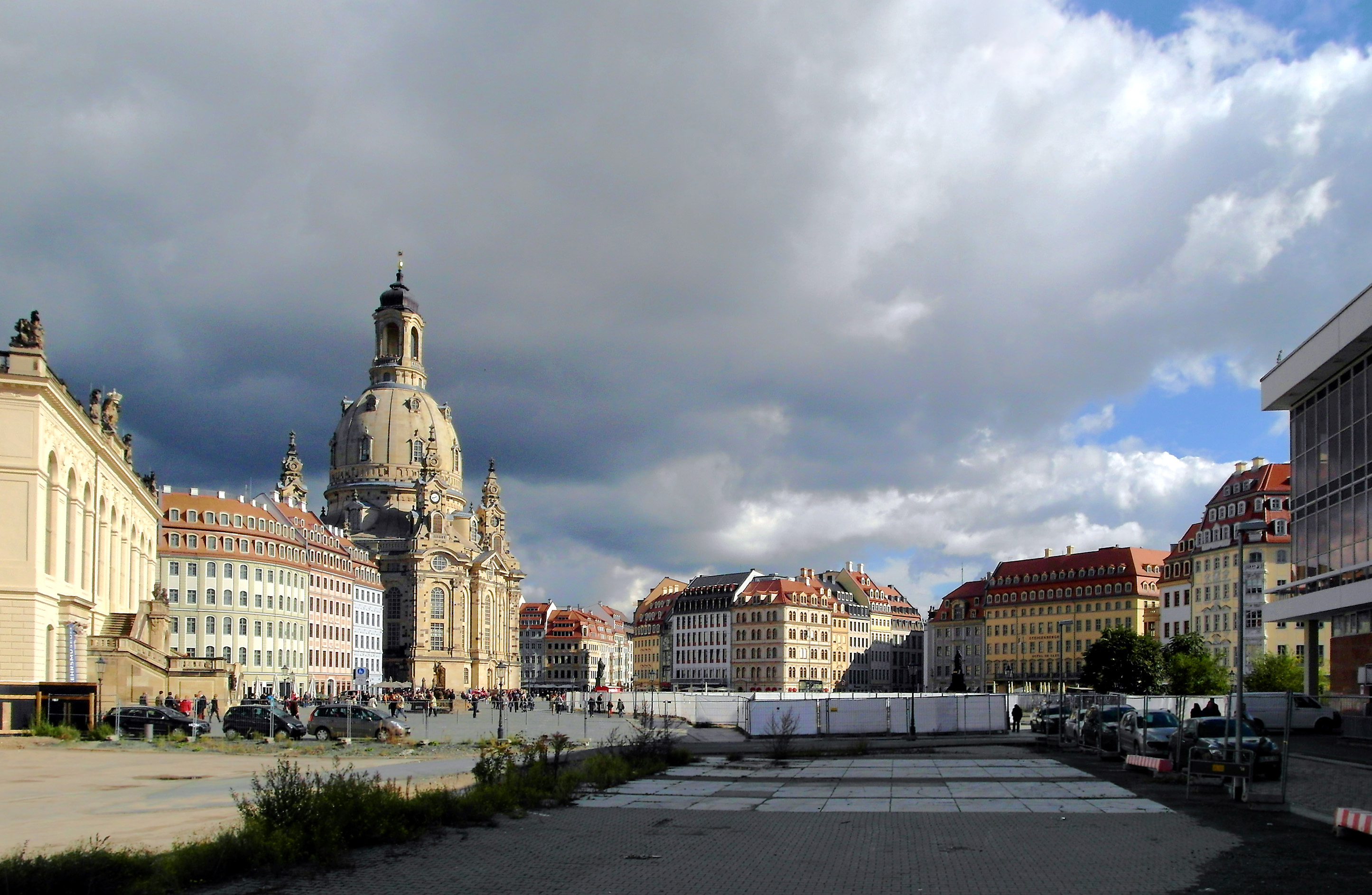 07.10.2012 01067 Dresden-Altstadt: Panorama von der Schloßstraße nach Osten zum Neumarkt mit der Frauenkirche. Diese Sichtachse wird später durch die Bebauung am Jüdenhof im Vordergrund verbaut sein. [SAM1196.JPG]20121007201DR.JPG(c)Blobelt